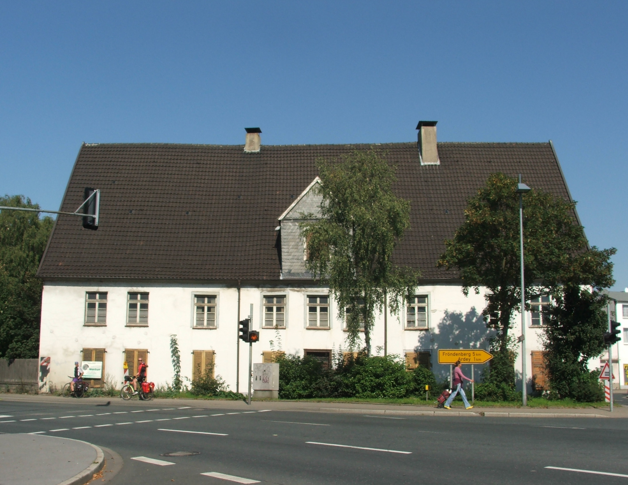 Haus Schoppe, Fröndenberg-Langschede, Germany